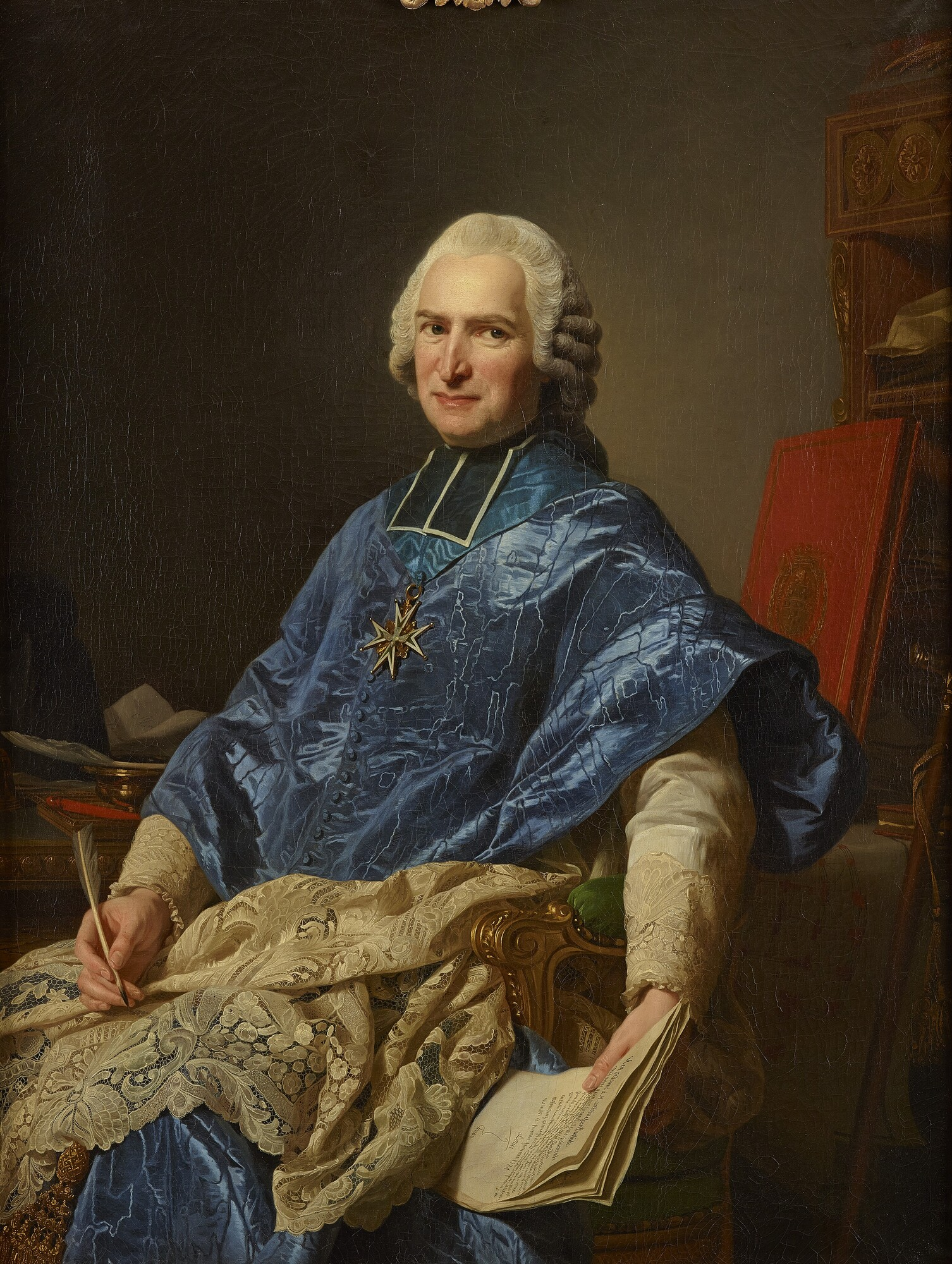 Portrait de Joseph Marie Terray (1715-1778), abbé de Molesmes, ministre de Louis XV